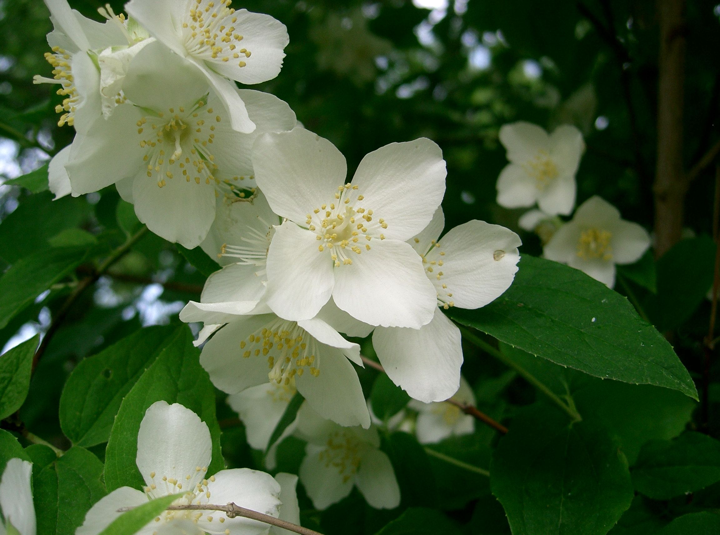 Scientific name Philadelphus satsumi